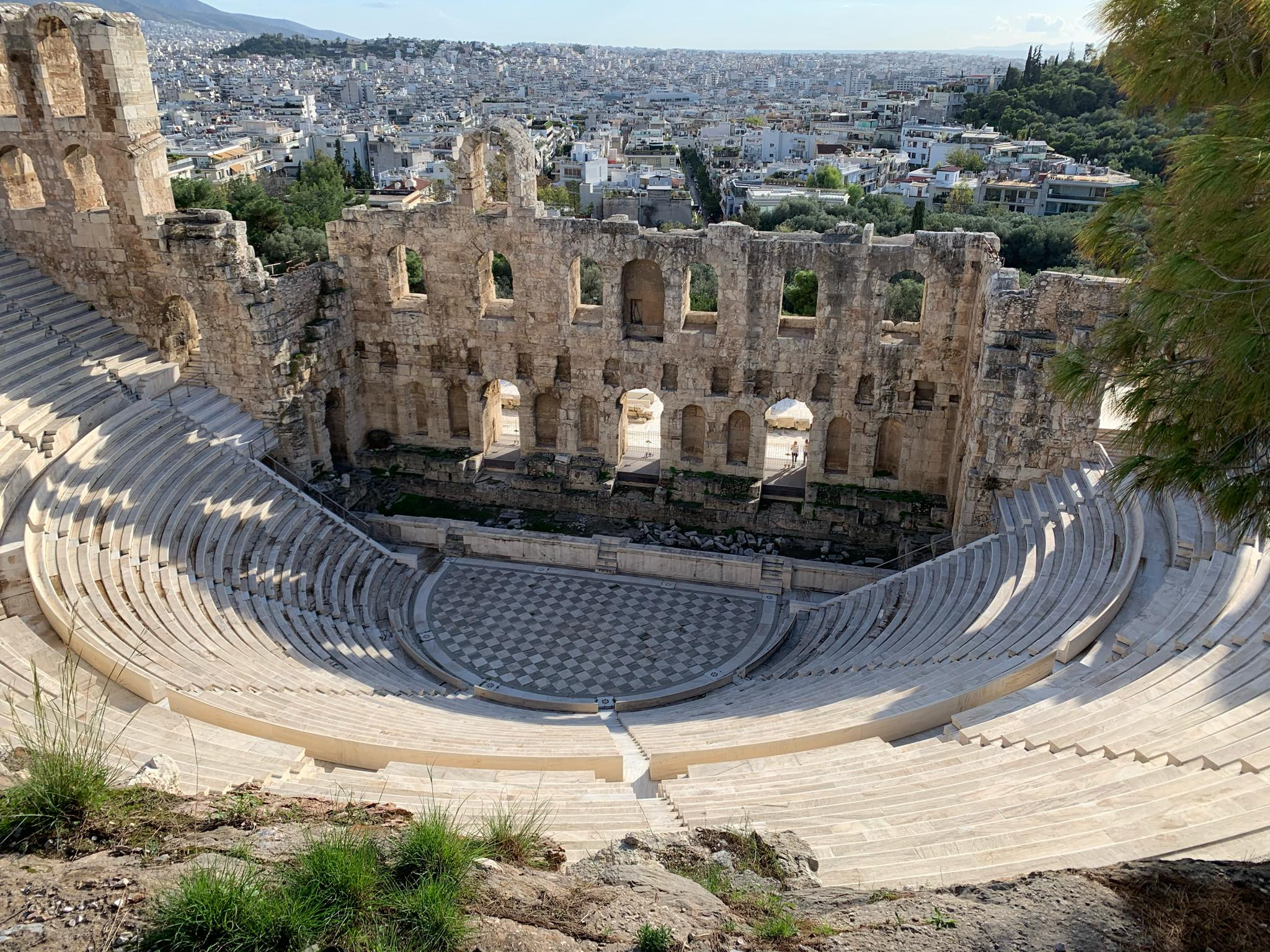 Древногръцки театър